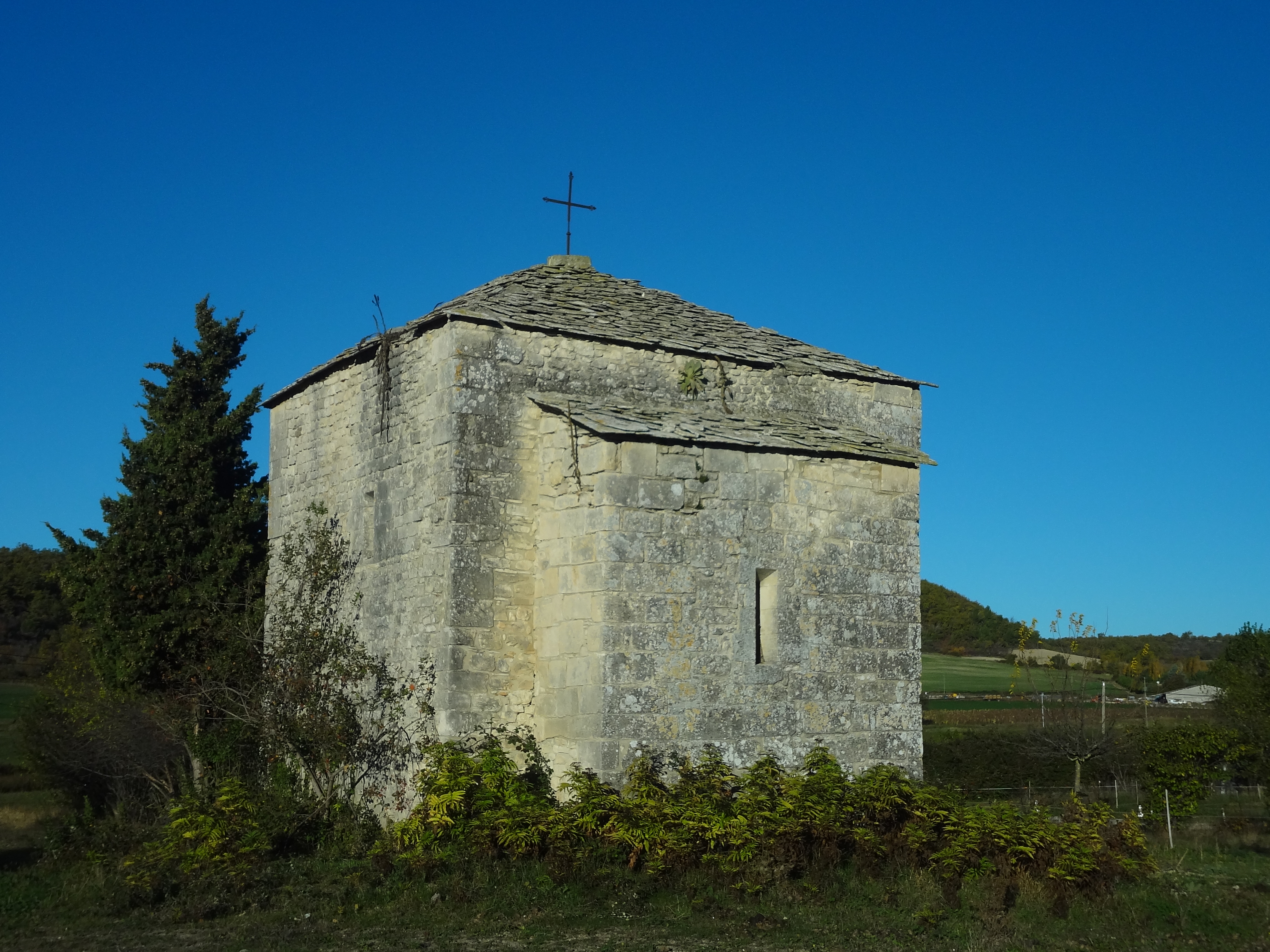 Chevet plat à abside carrée extérieurement, ouverte par une fenêtre très étroite